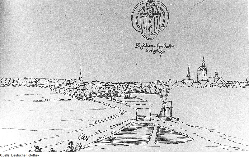 Original image description from the Deutsche Fotothek Brück. Stadtansicht, aus: Wilhelm Dilichs Federzeichnungen kursächs. und meißn. Ortschaften aus den Jahren 1626-1629